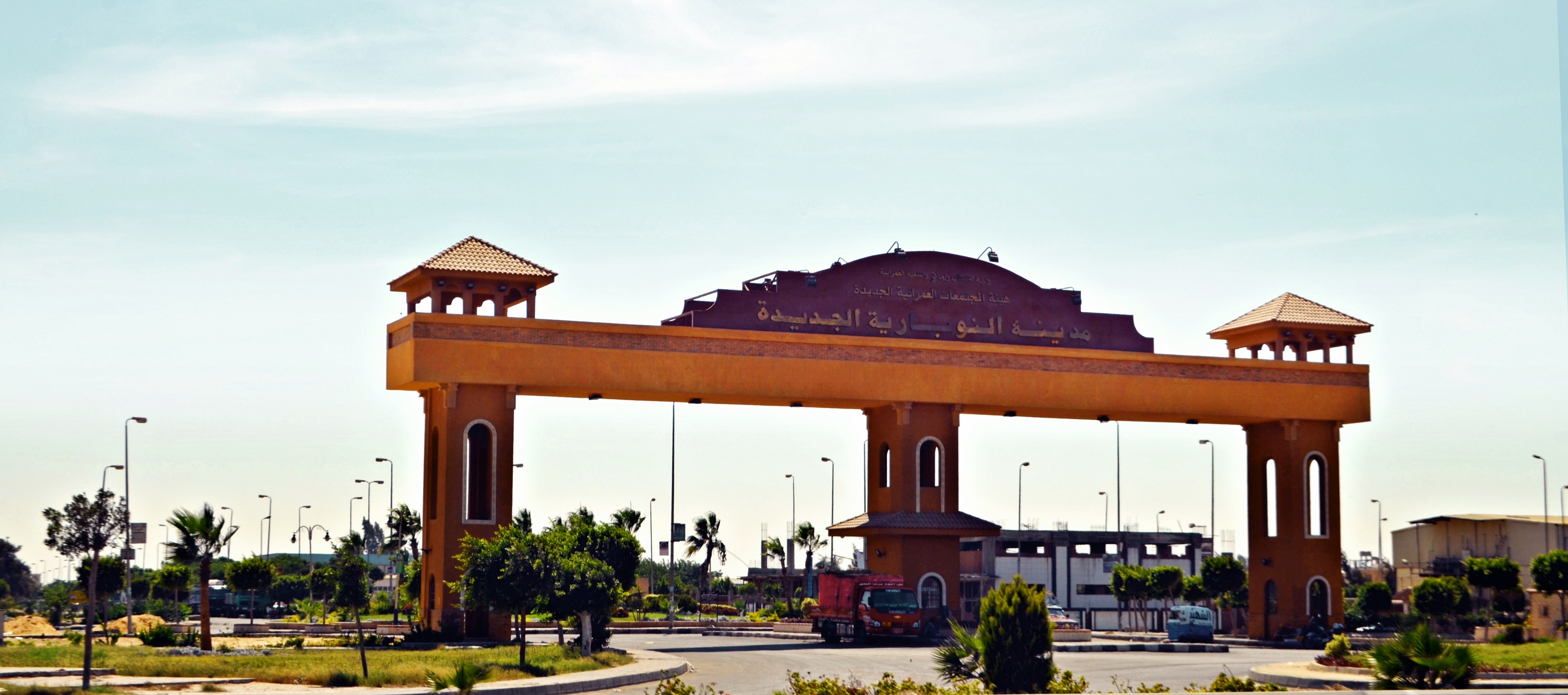 مدينة النوبارية الجديدة، محافظة البحيرة، مصر